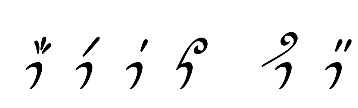 Avañe'ẽ: vot